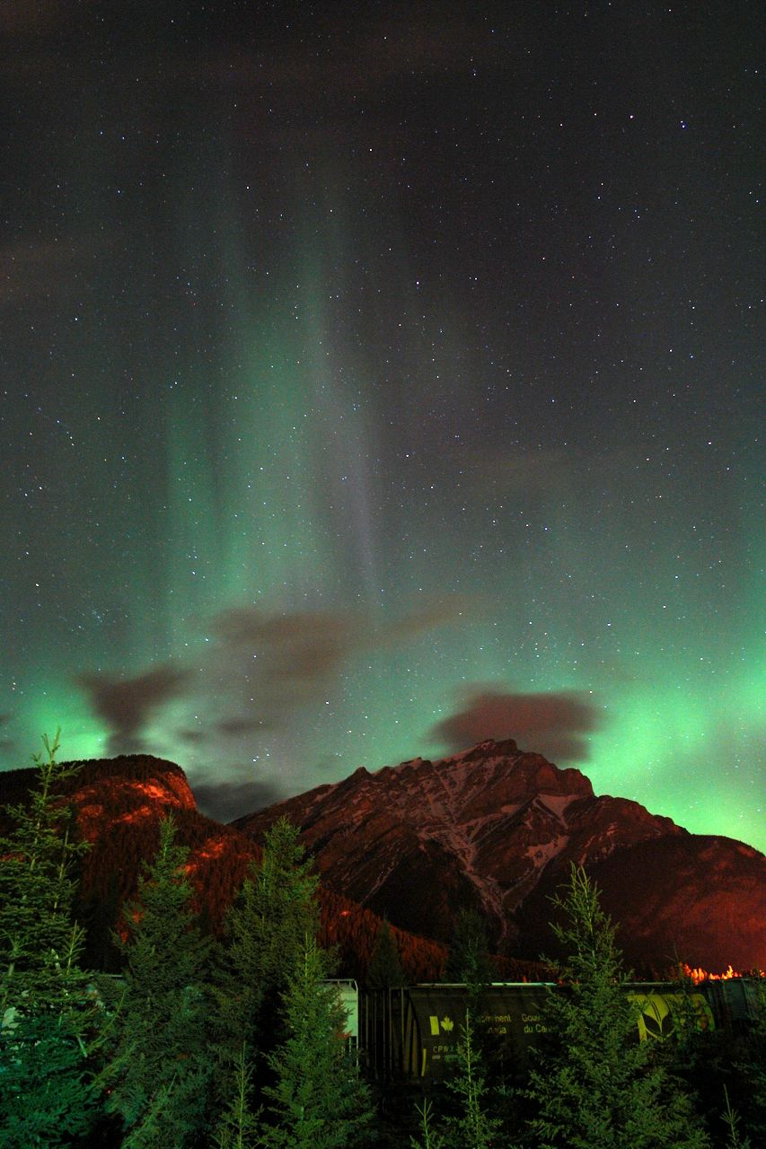 Aurora at Banff, Canada (Cascade Mountain}